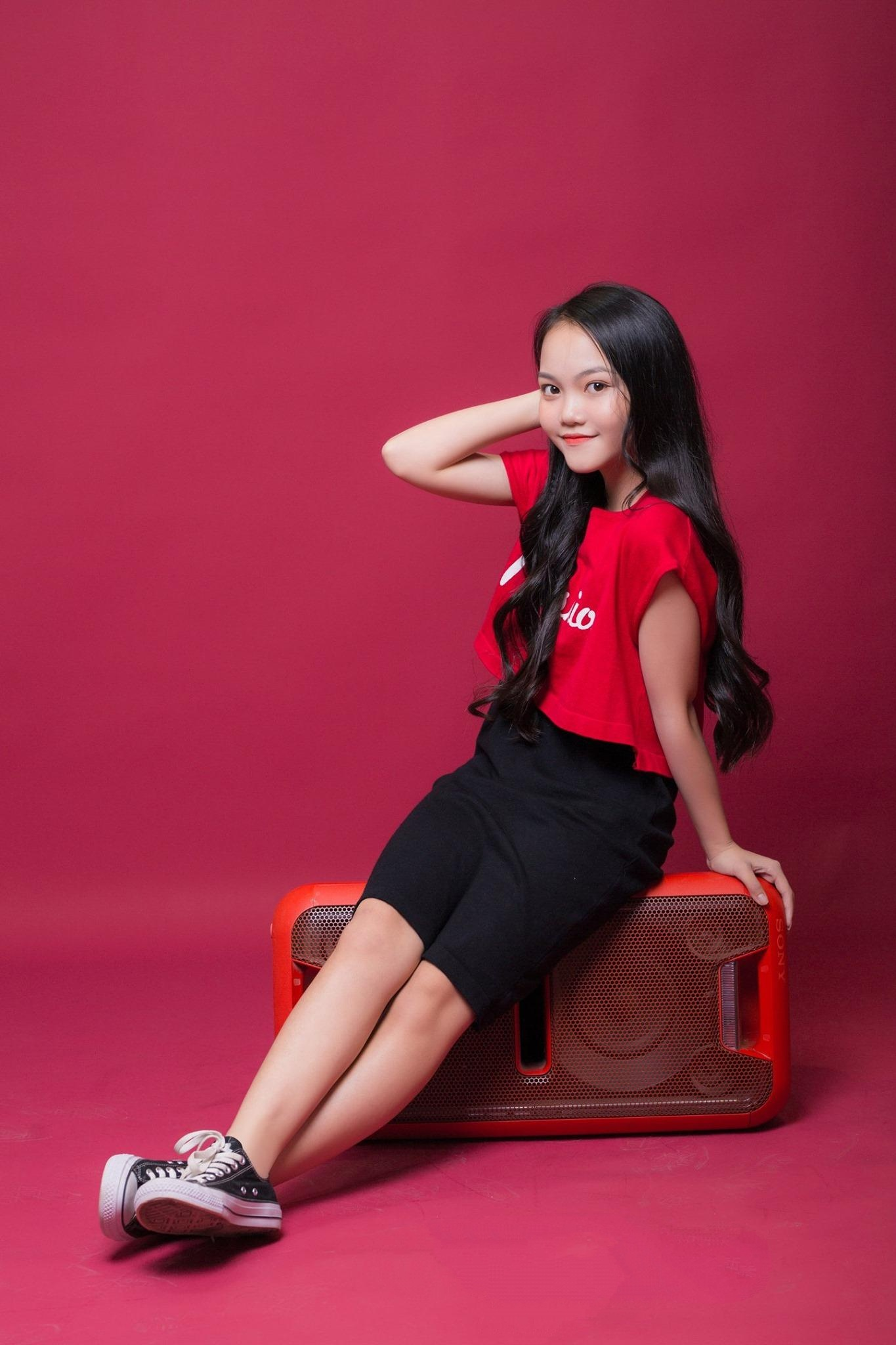 Hà Quỳnh Như in 2019